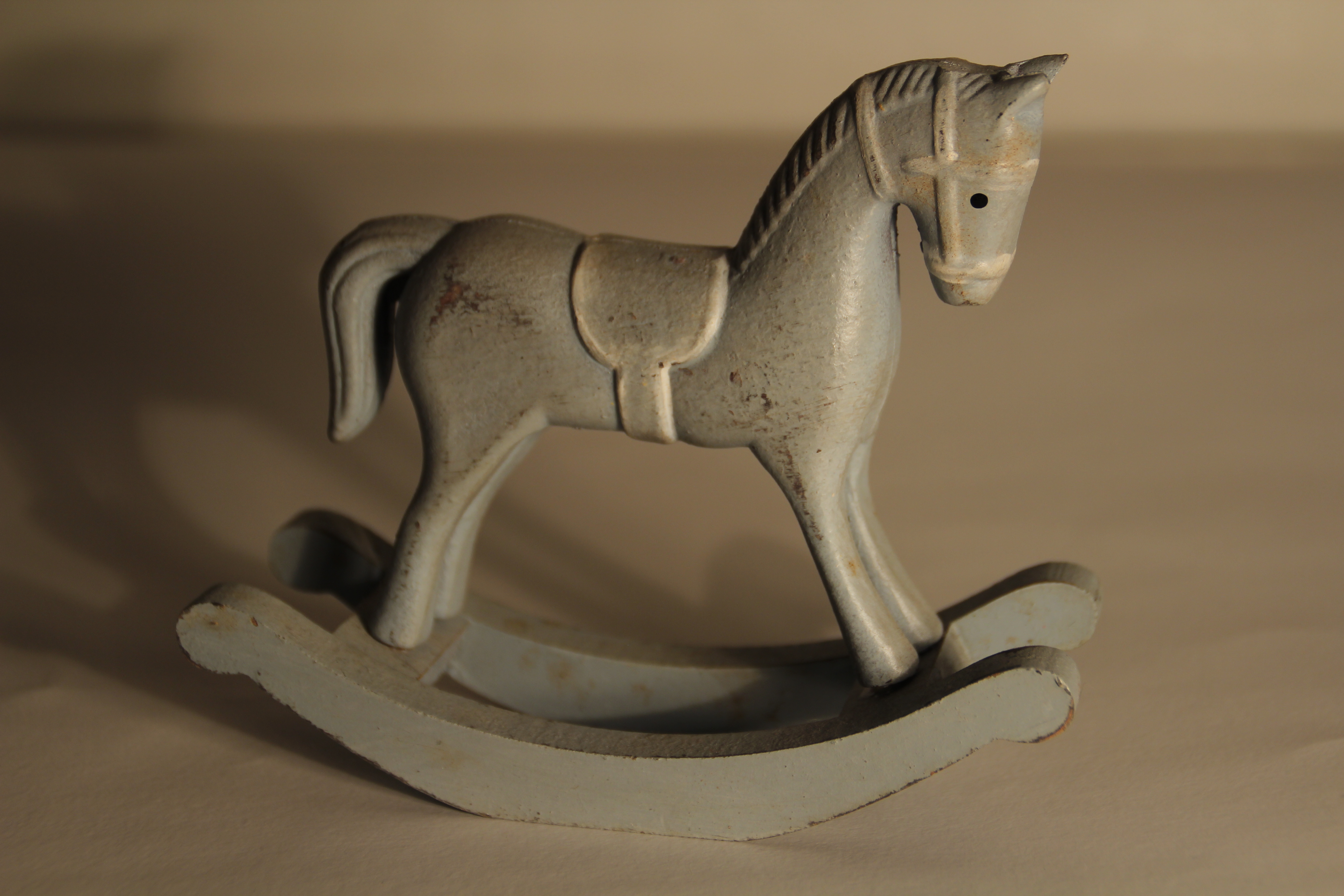 סוס נדנדה